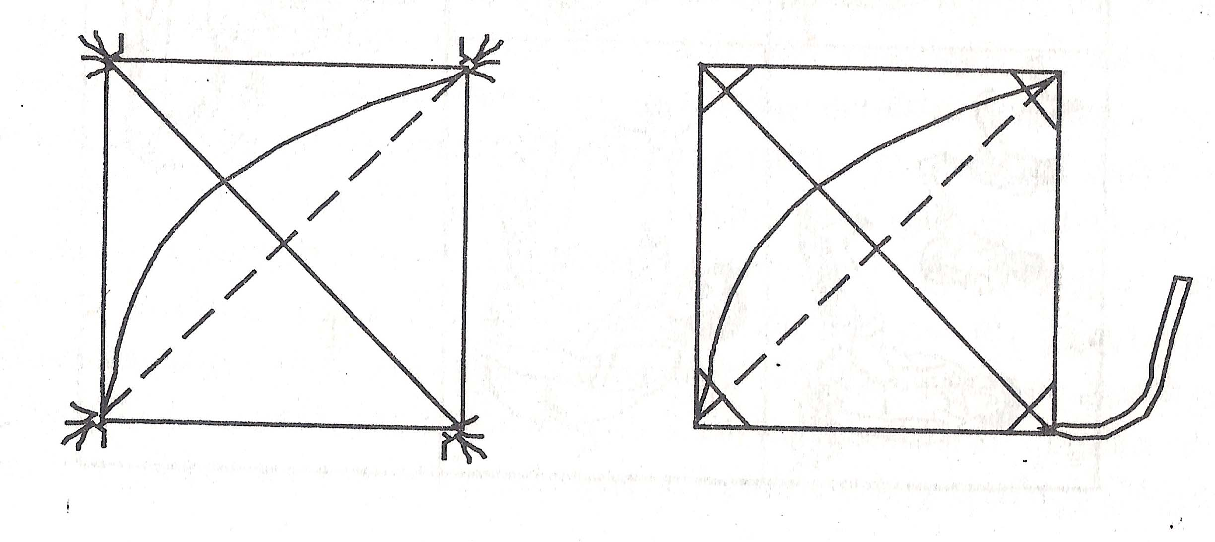 சிறுவர் தாம் விளையாடத் தாமே செய்துகொள்ளும் பட்டத்தின் கோட்டுப்படம். மறைகின்ற விளையாட்டுகள் என்னும் எனது நூலிலிருந்து எடுத்துப் பதிவேற்றப்பட்டுள்ளது.